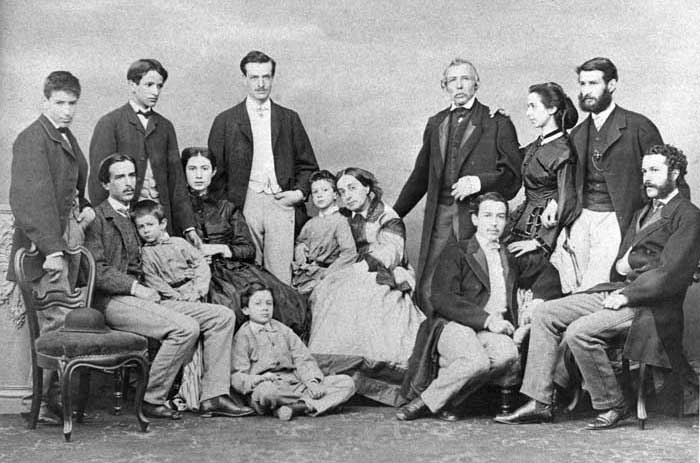 El conde Ascanio di Brazzà-Cergneu-Savorgnan con su familia.